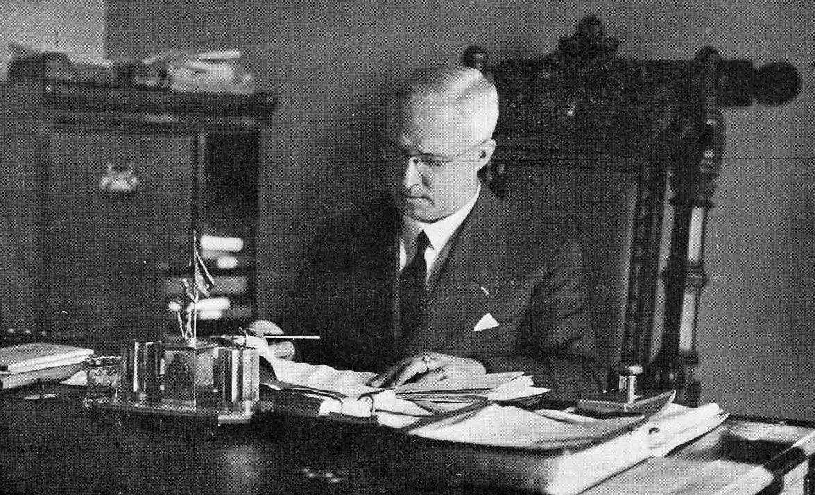 Ángel del Castillo, fotografía en Vida Gallega 1933